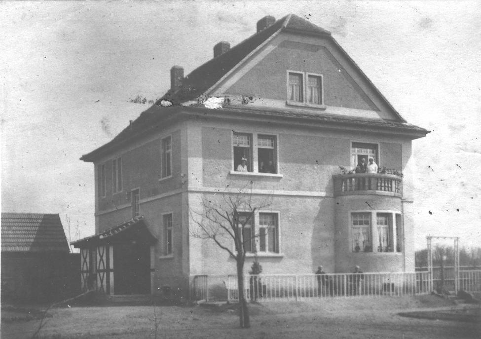 Die Stadtvilla der Familie Neubert in der Eibacher-Hauptstr. 15 um 1920